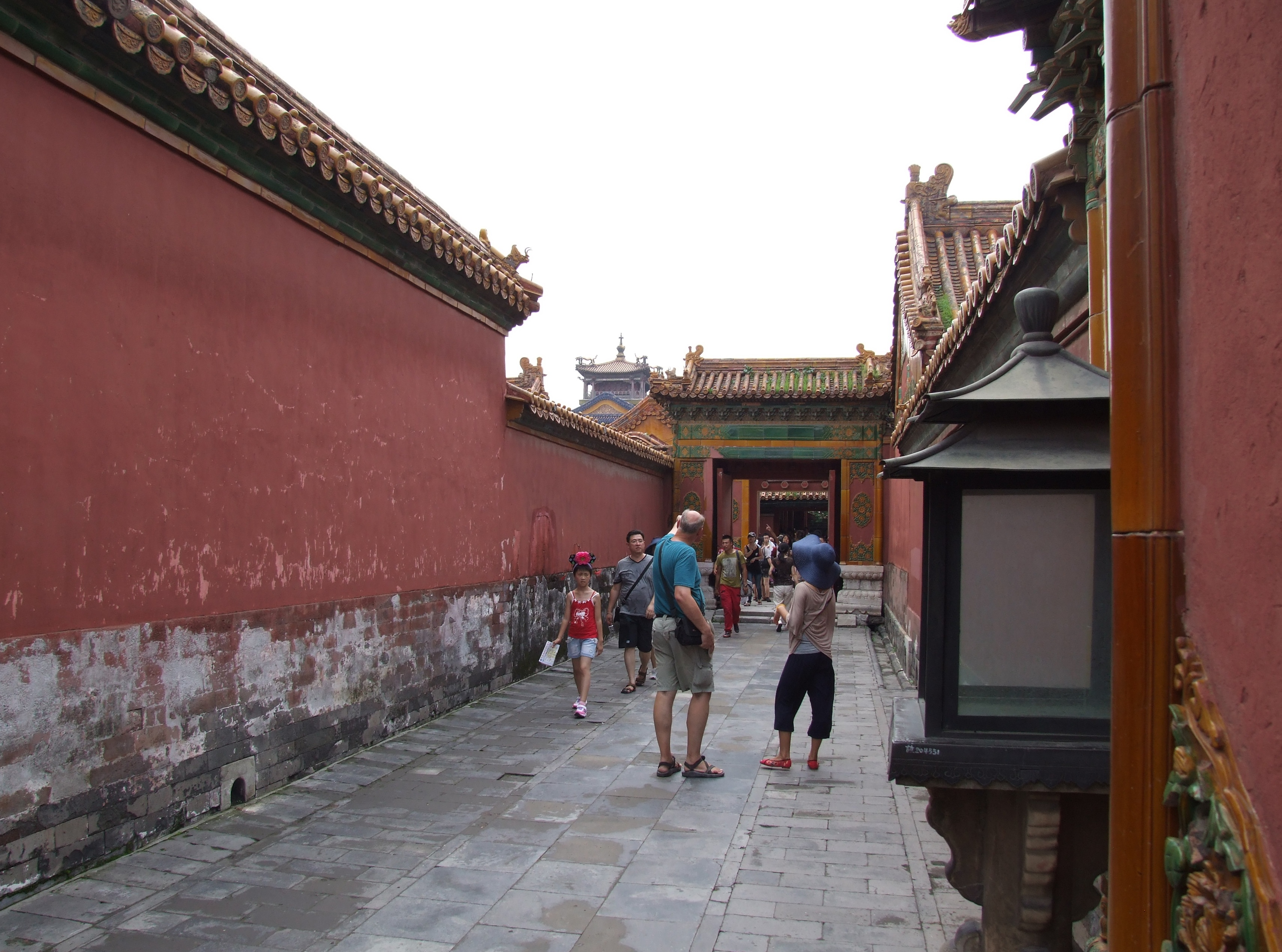 Verbotene Stadt